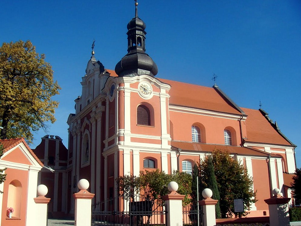 Kościół Wniebowzięcia Najświętszej Maryi Panny w Kłodawie (powiat kolski)